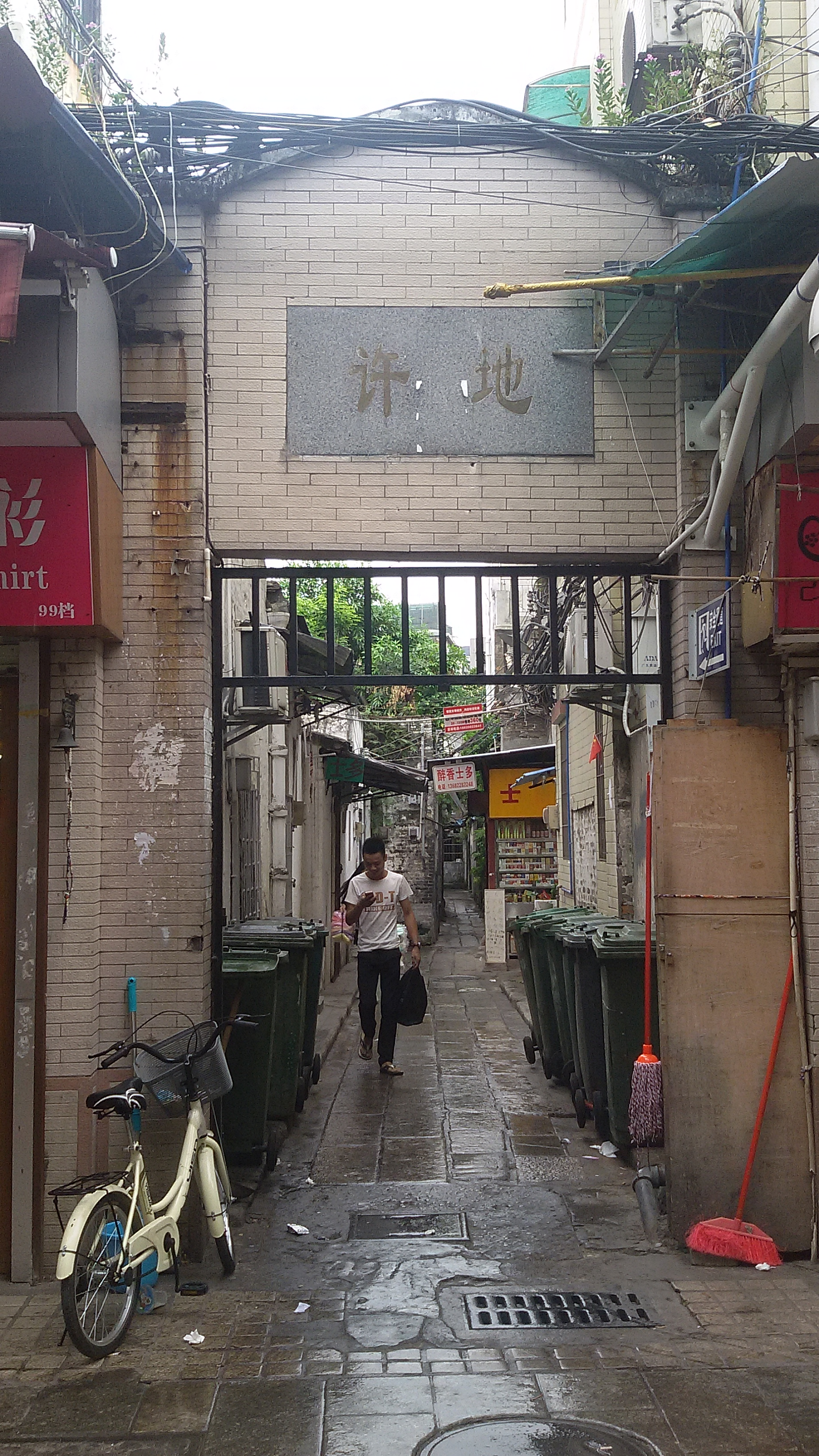 粵語: 許地嘅南街道口